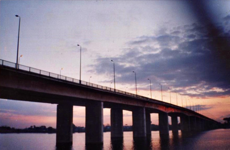 كوبري دسوق العلوي ساعة الغروب